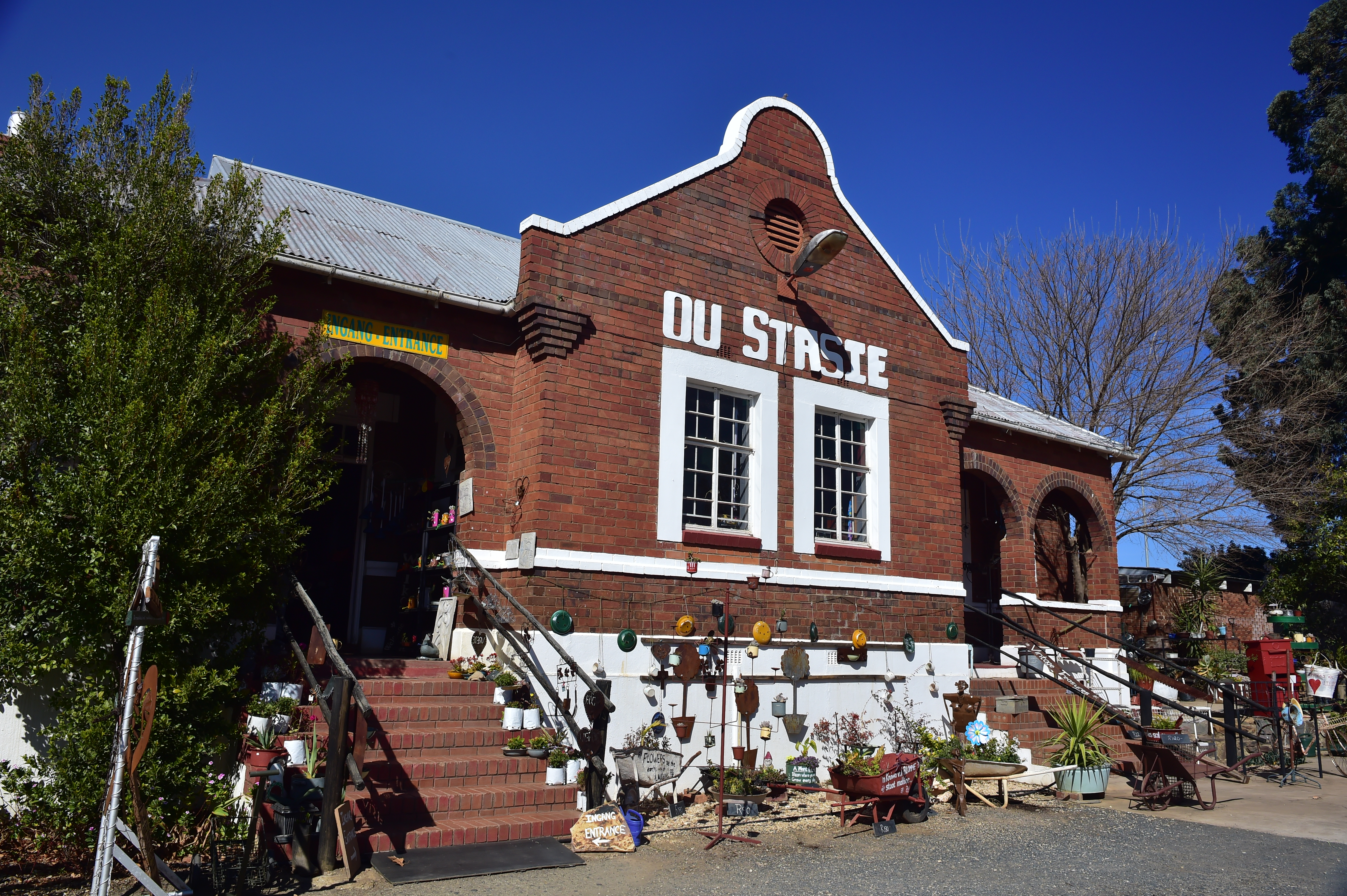 Vue du North West en Afrique du Sud.